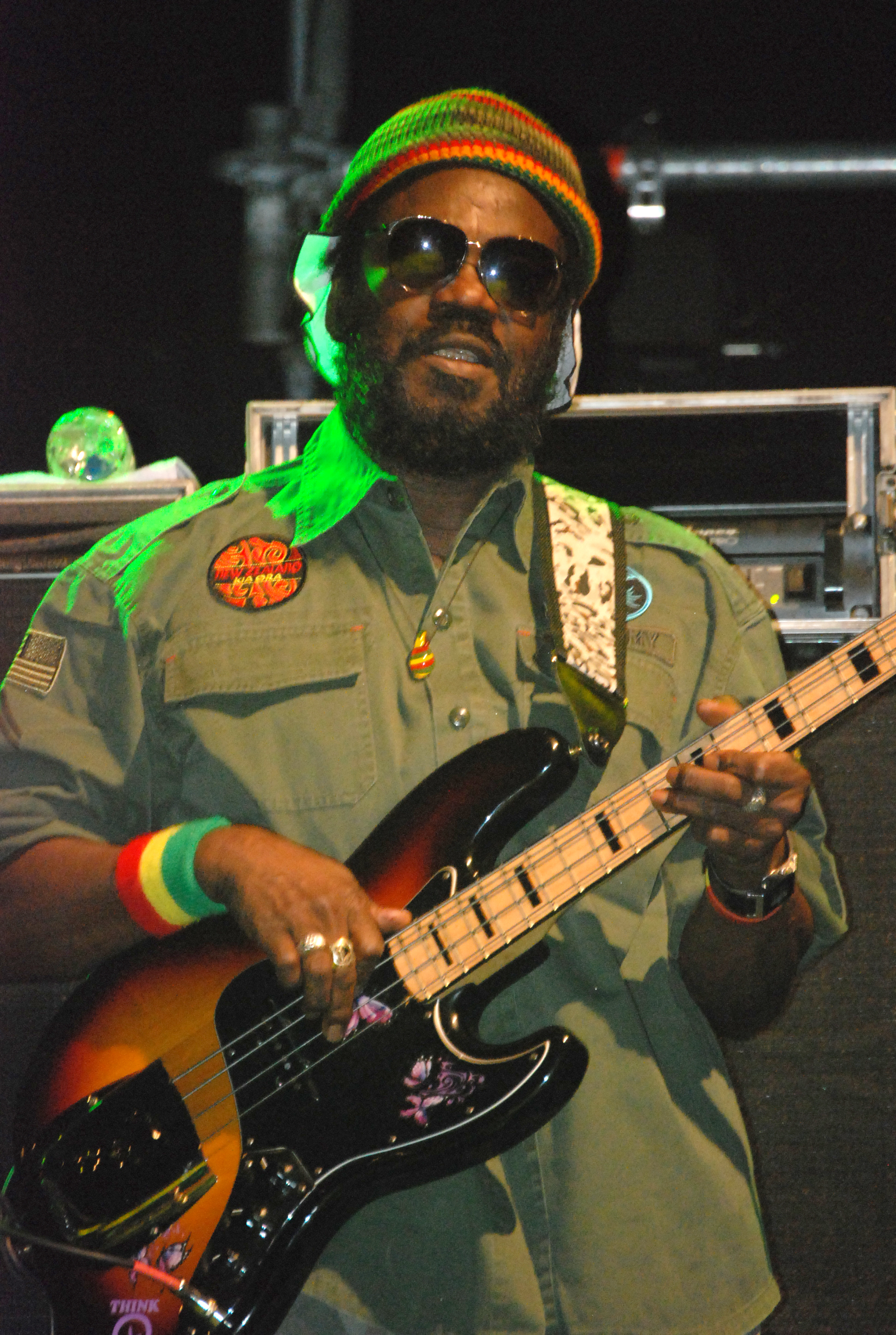 Aston "Family Man" Barrett en el Hipódromo de La Plata Argentina el 28-11-2010